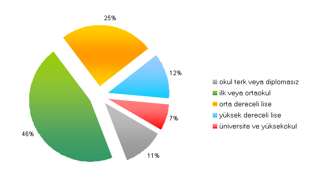 Lisans